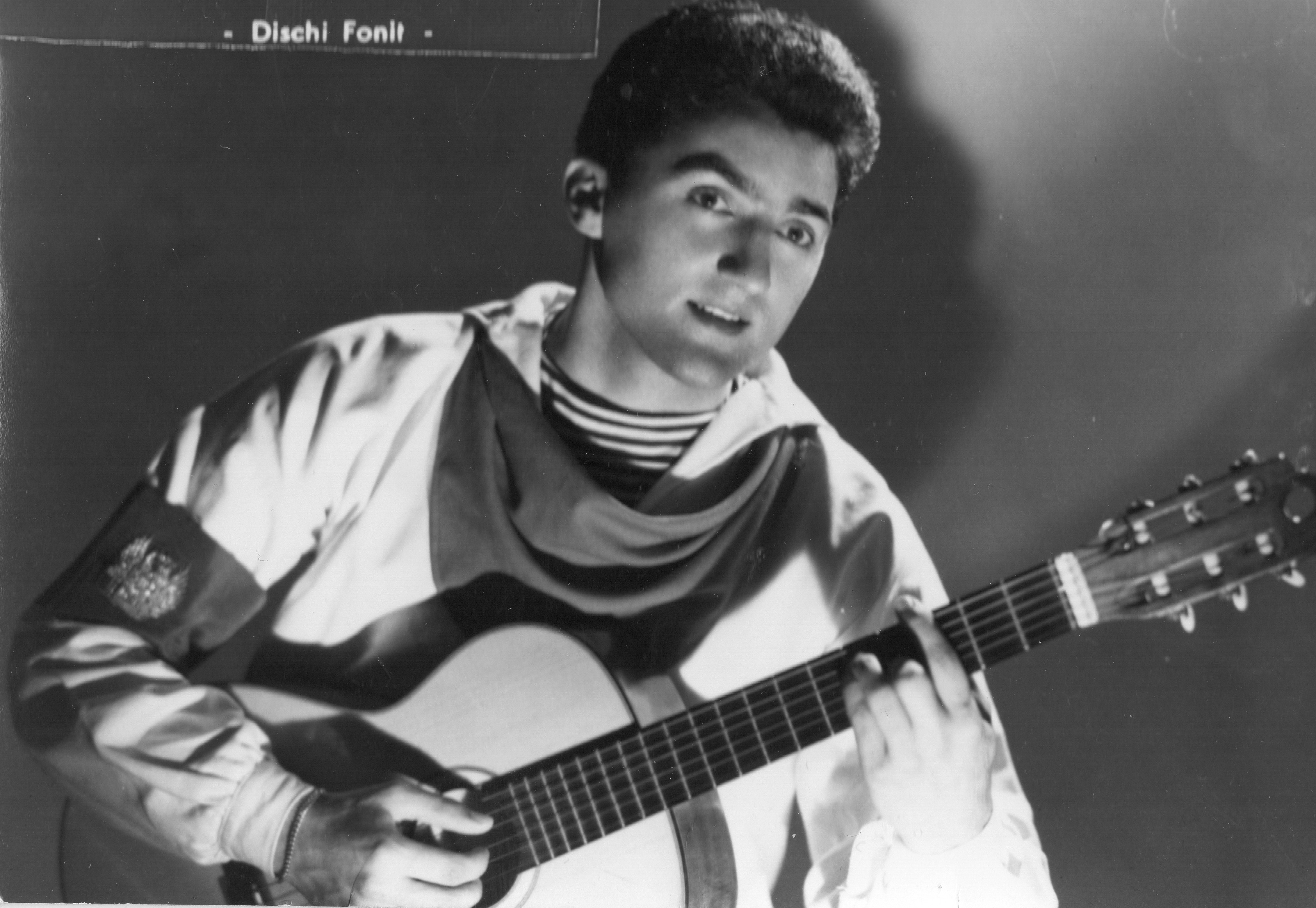 umberto da preda cantautore venziano